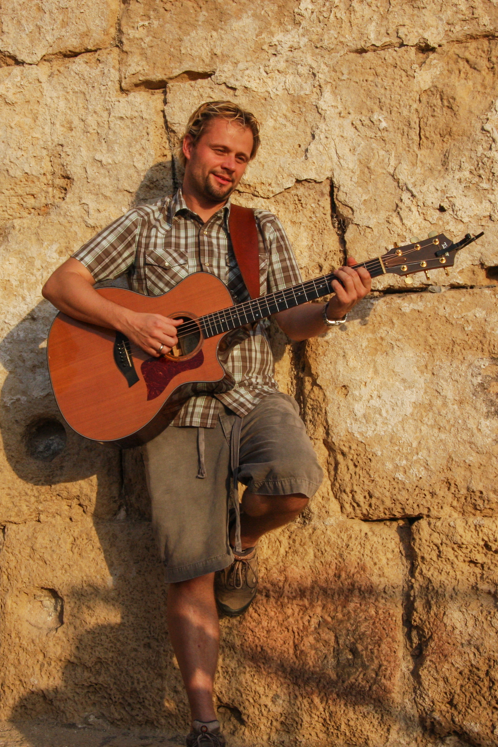 Arne Kopfermann 2008 in Israel